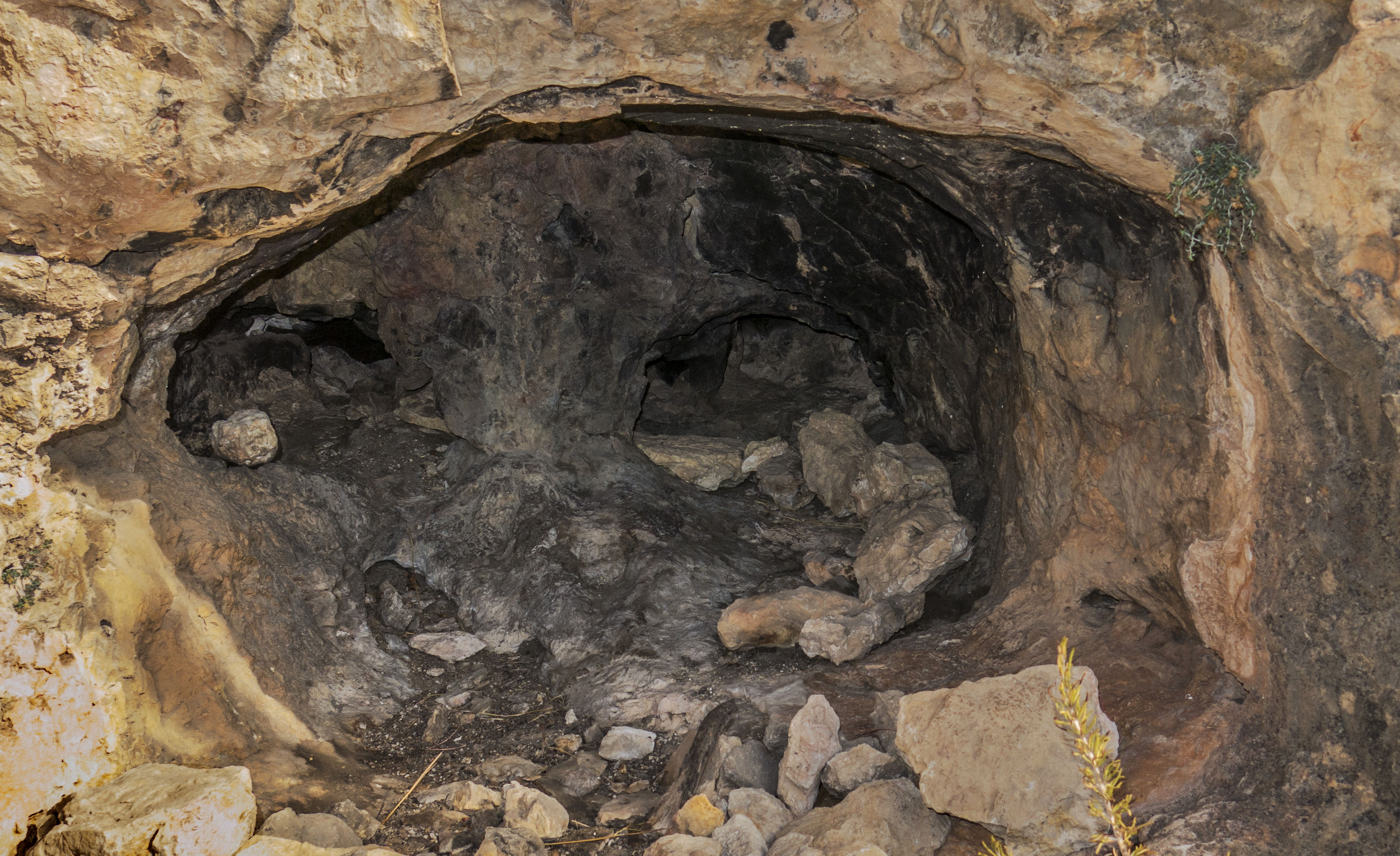 La Coveta del Matamon (o abric rocós) està situada al terme de Tous (País Valencià), a migdia del Matamon; i al sud de l'Avenc de l'Infern, també anomenat Cova de Primo.